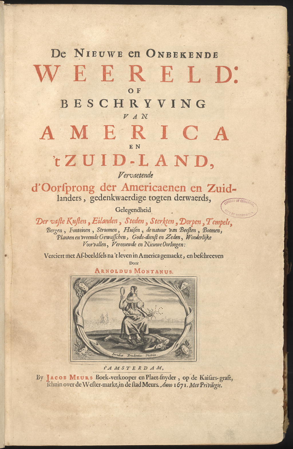 Fotografie eines Buchtitels